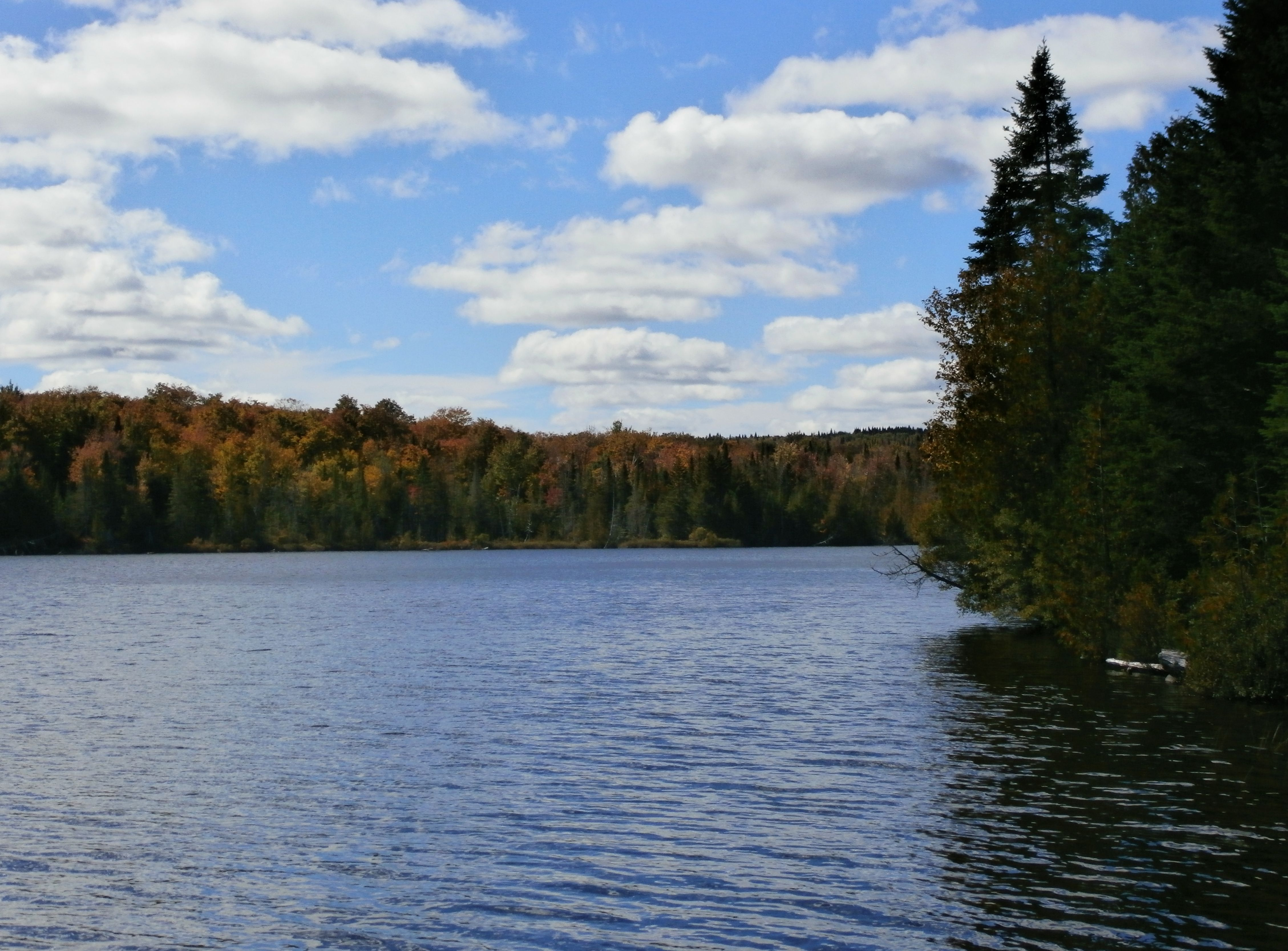 Lac Whitton vu de l'accès public à Nantes.